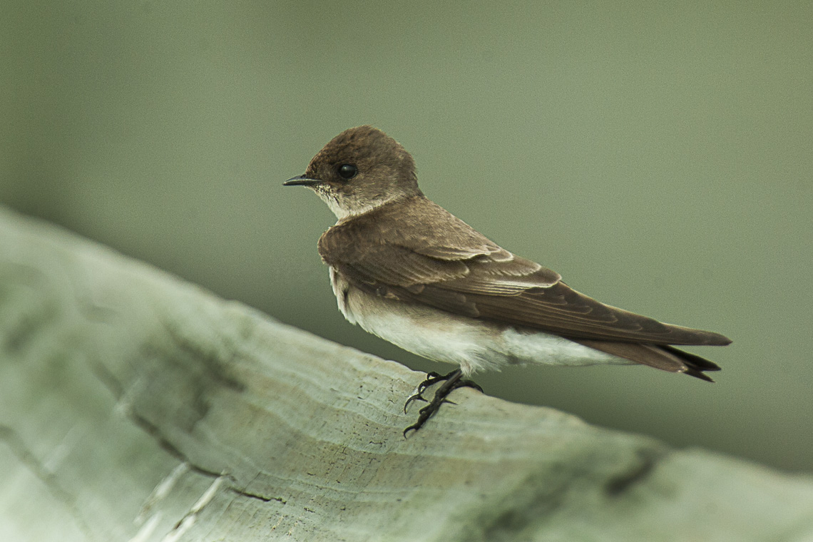 Bank Swallow - Texas_H8O5372